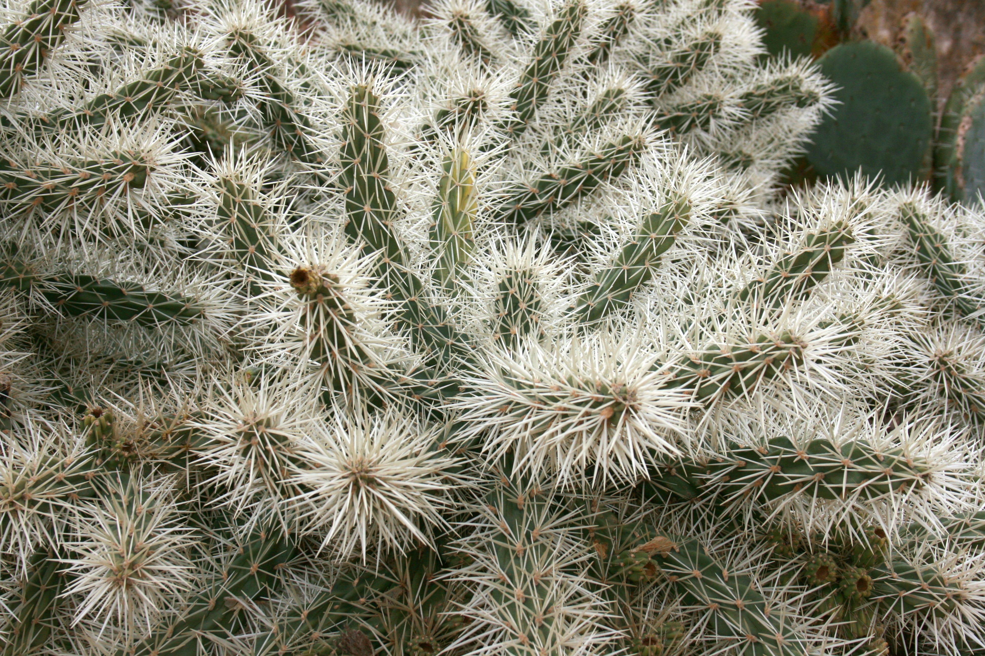 Botanicactus in Ses Salines, Mallorca, Spain